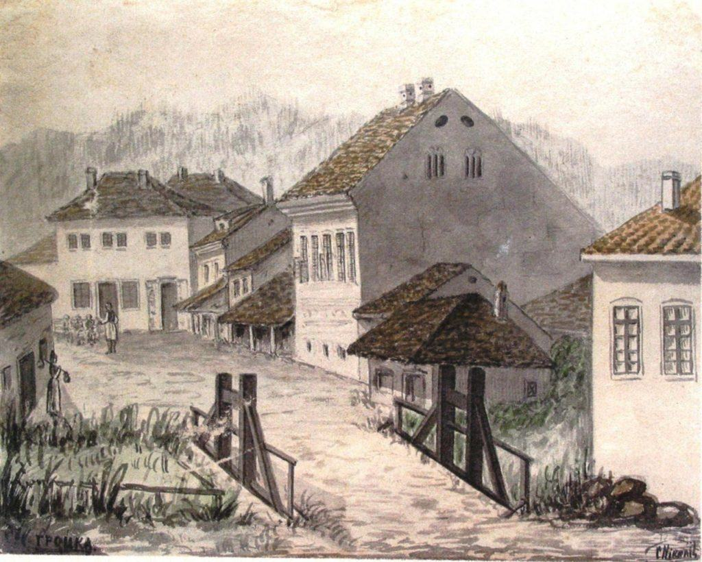 Akvarel Gročanske čaršije (autor: Stojan Nikolić, oko 1880, Galerija Matice srpske, Novi Sad, 1024x820